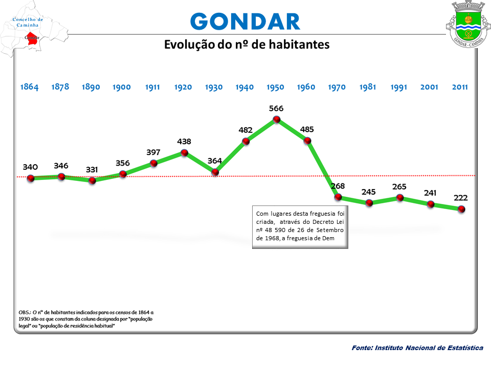 Censos 1864/2011